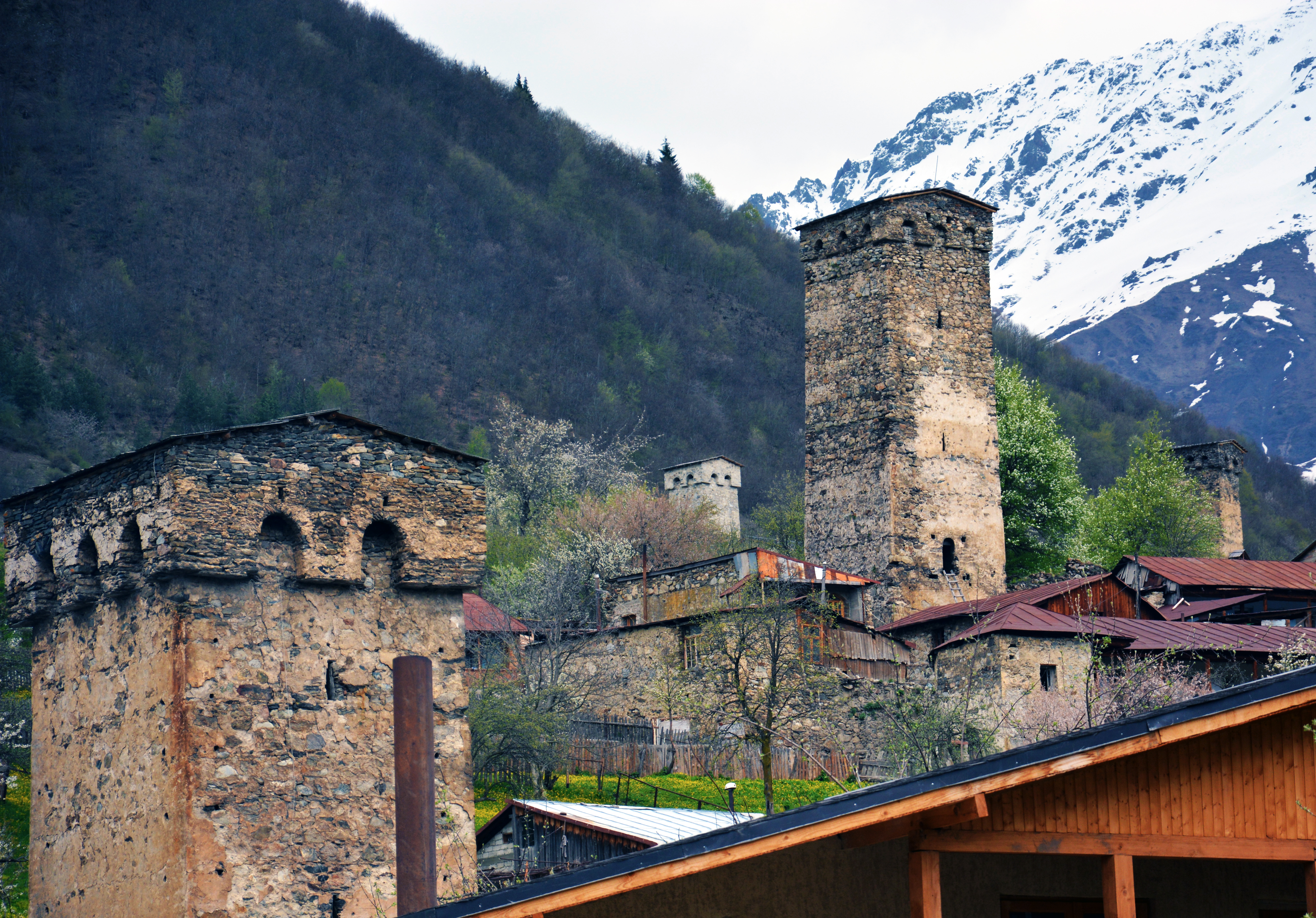 სვანური კოშკები მესტიაში